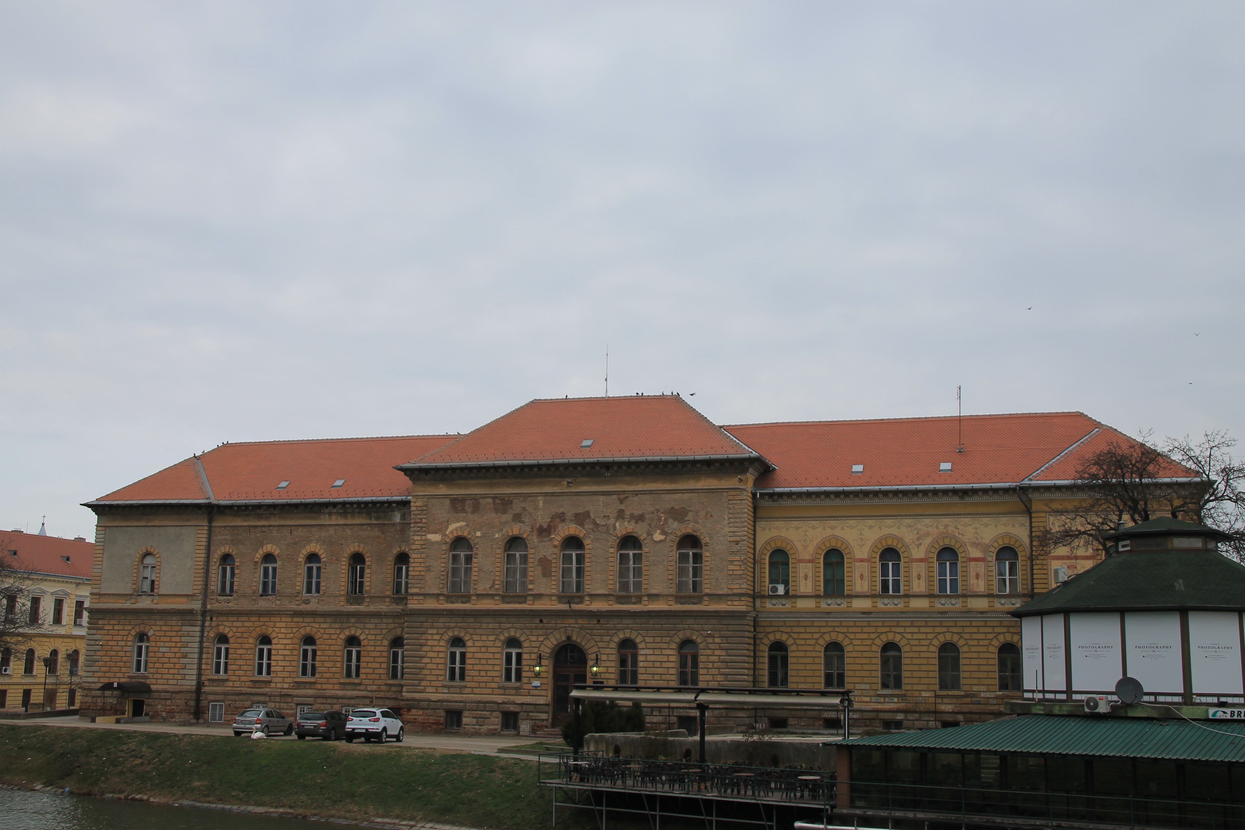 Staro jezgro Zrenjanina